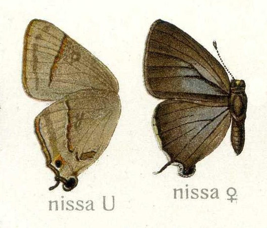 Rapala nissa